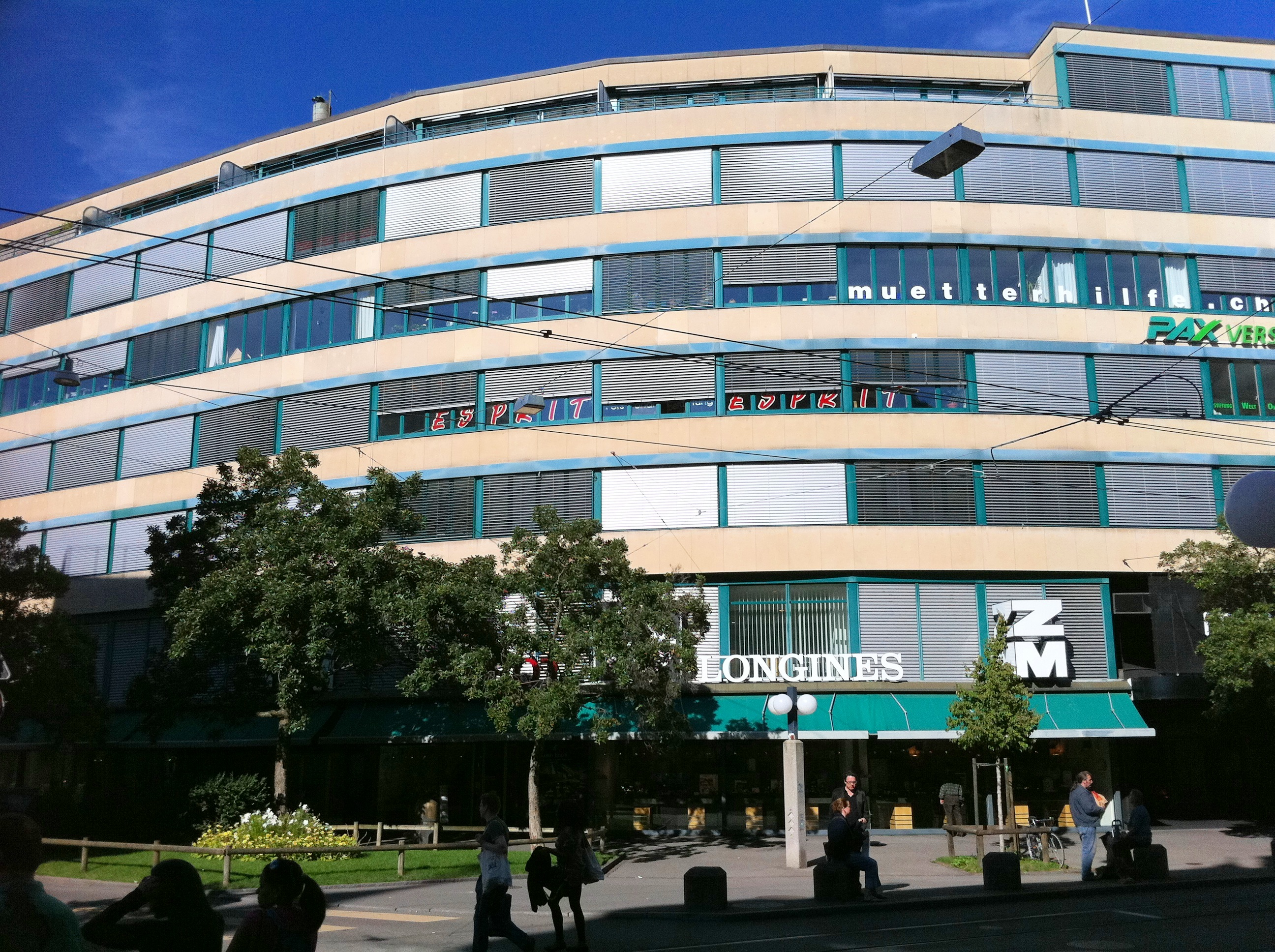 Zett-Haus beim Stauffacher in Zürich